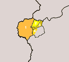 Gallego de Xálima